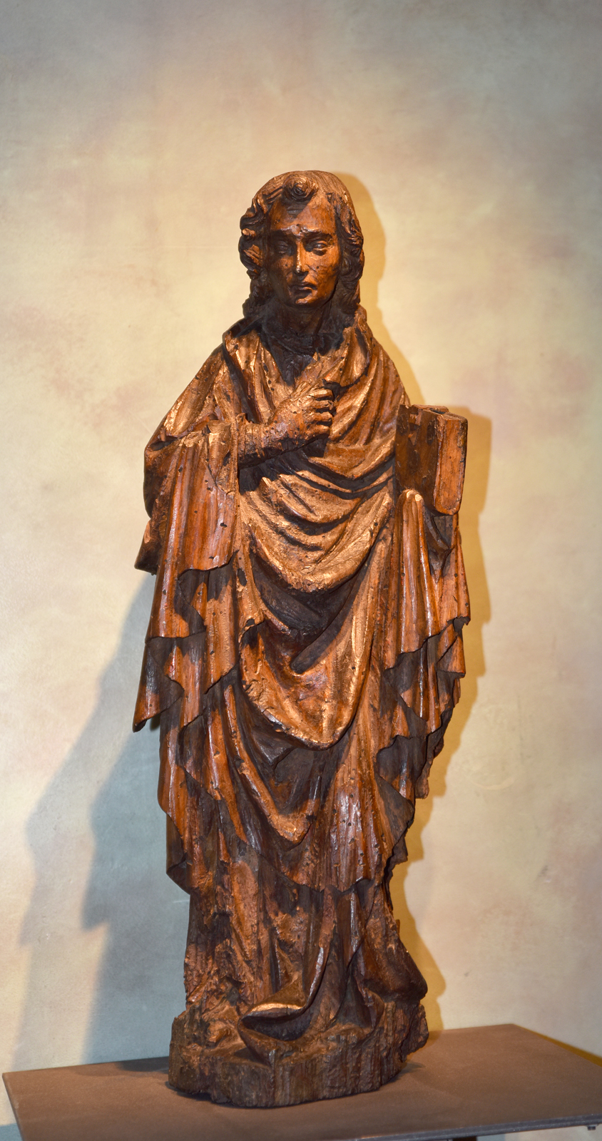 Sv. Jan Evangelista, Mistr Týnské Kalvárie (kolem 1410), Národní galerie v Praze